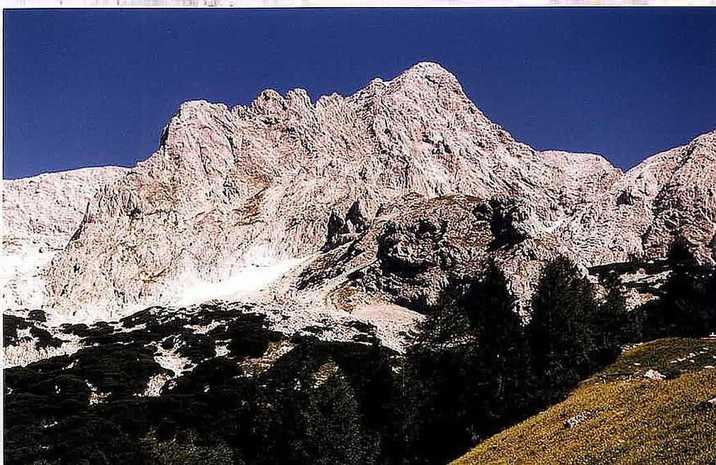 Grosser Priel od chaty Priel Schutzhaus